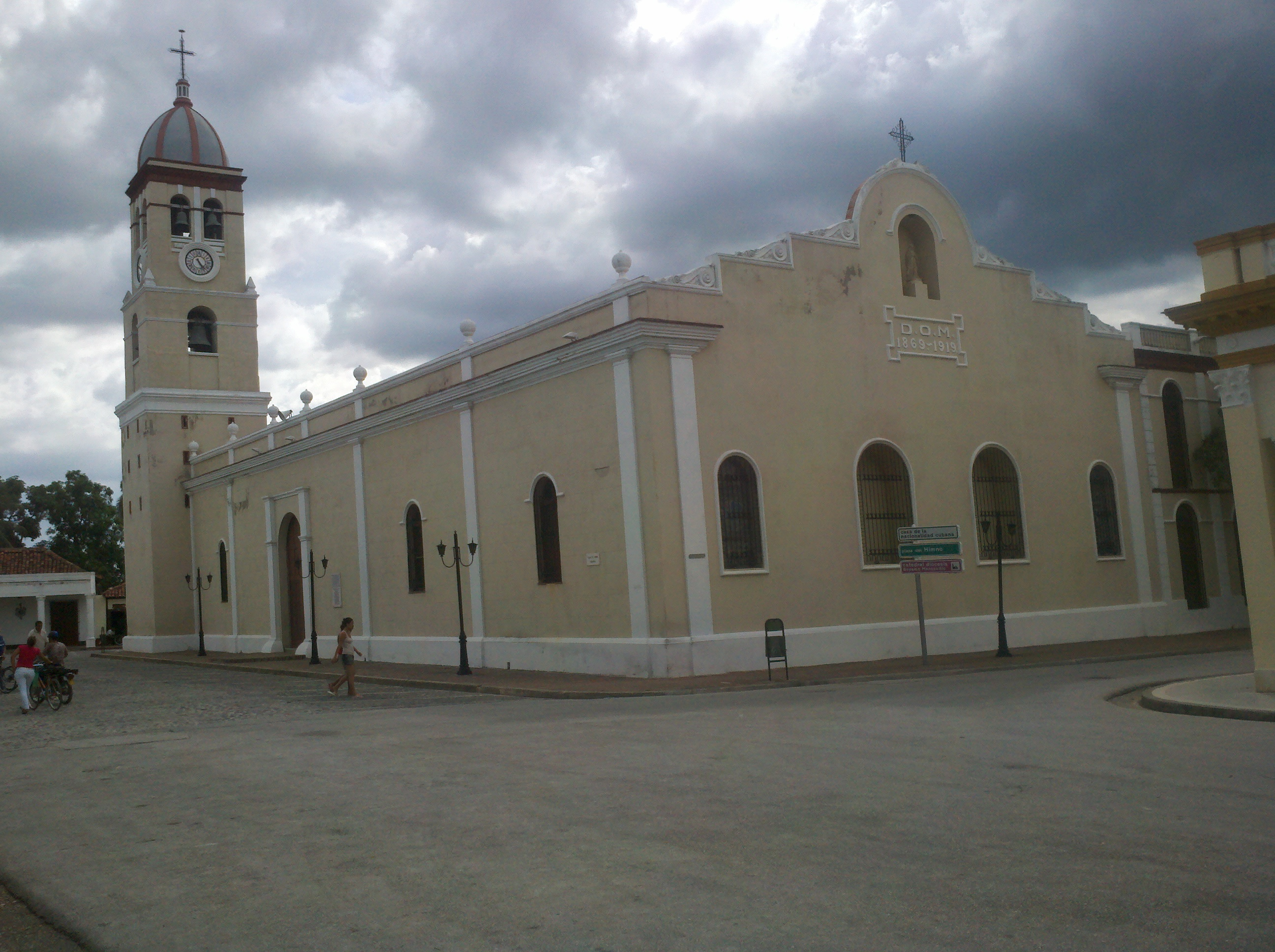 Bayamo